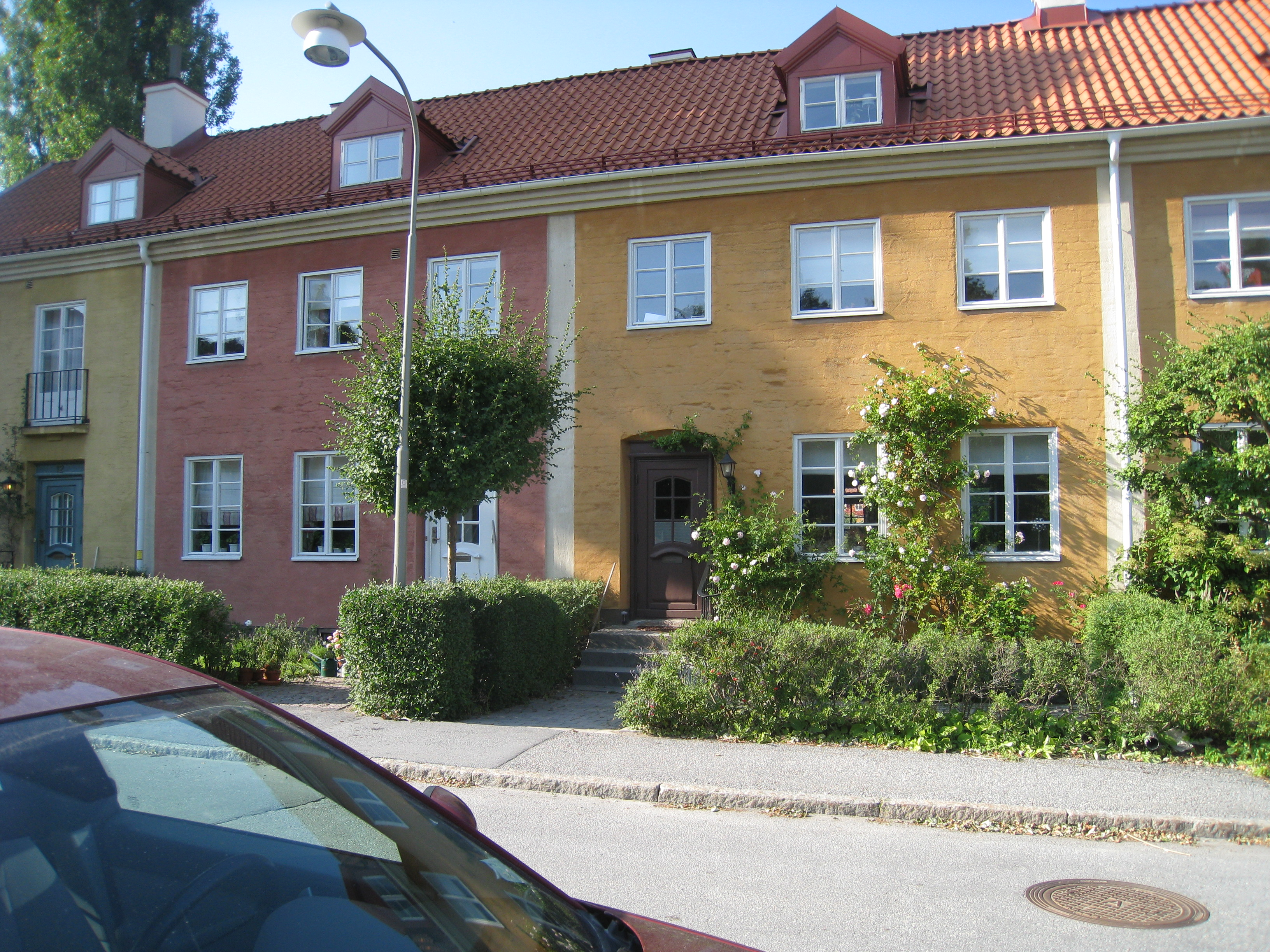 Kvarteret Drivbänken vid Äppelvikstorget 16-20 i Äppelviken, Bromma, väster om Stockholm. De så kallade "engelska radhusen" byggdes vid Alviksvägen vid Alléparken och uppfördes 1919-1920. Arkitekt var Gunnar Wetterling.